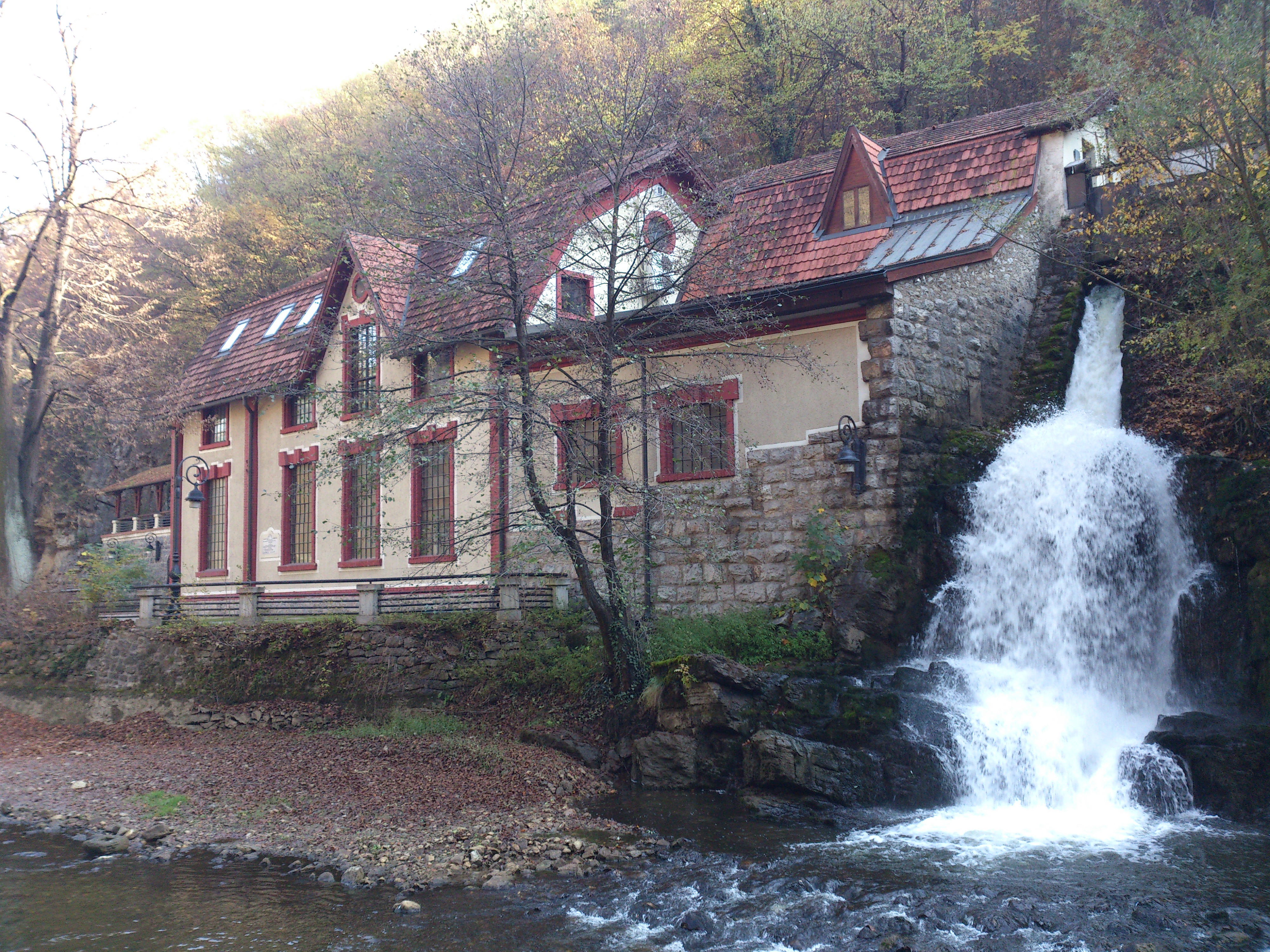 Hidroelektrana na Đetinji ili Centrala pod Starim gradom u Užicu je prva hidroelektrana višefaznog sistema u Srbiji. Nalazi se na reci Đetinji na mestu koje Užičani zovu Stara plaža. Druga je hidroelektrana u svetu, napravljena po Teslinim principima višefaznih struja, posle hidroelektrane na Nijagari.